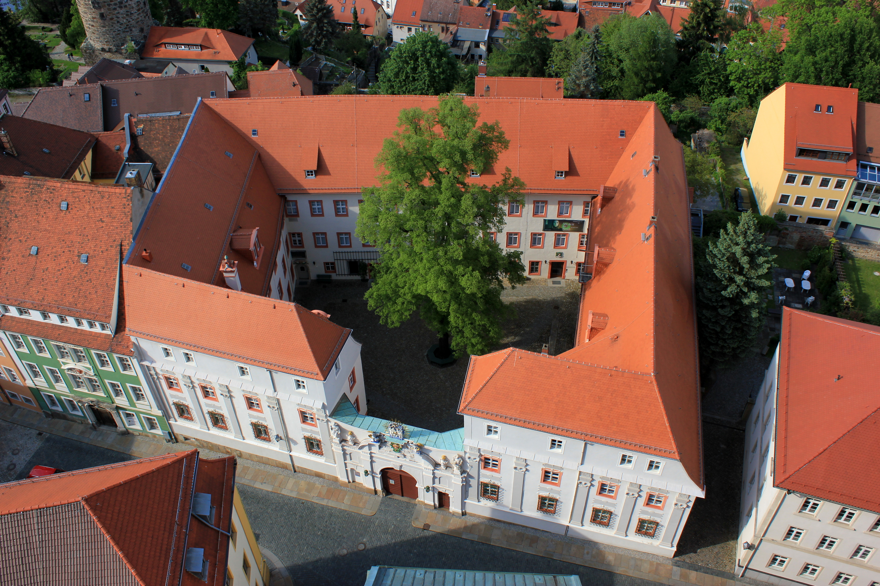 Hornjoserbsce: Budyske tachantstwo z wěže Tachantskeje cyrkwje.